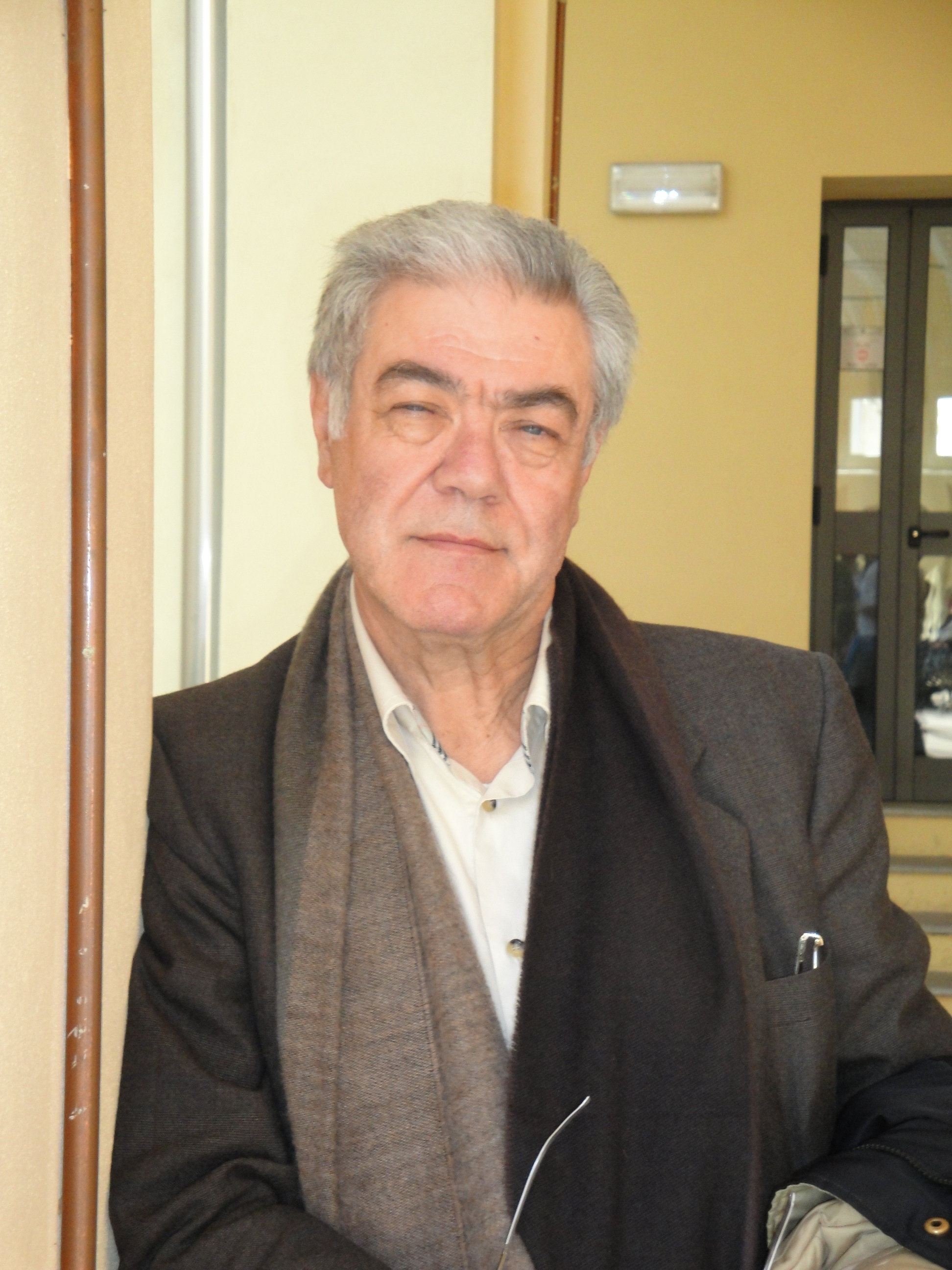 Foto del poeta Nino De Vita